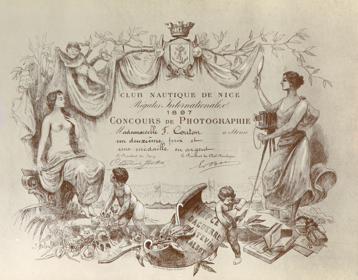 Remarque sur la réunion de 4 grands noms de la photographie: Niepce, Daguerre, Poitevin et Talbot